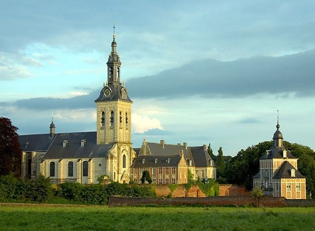 abdij van 't Park